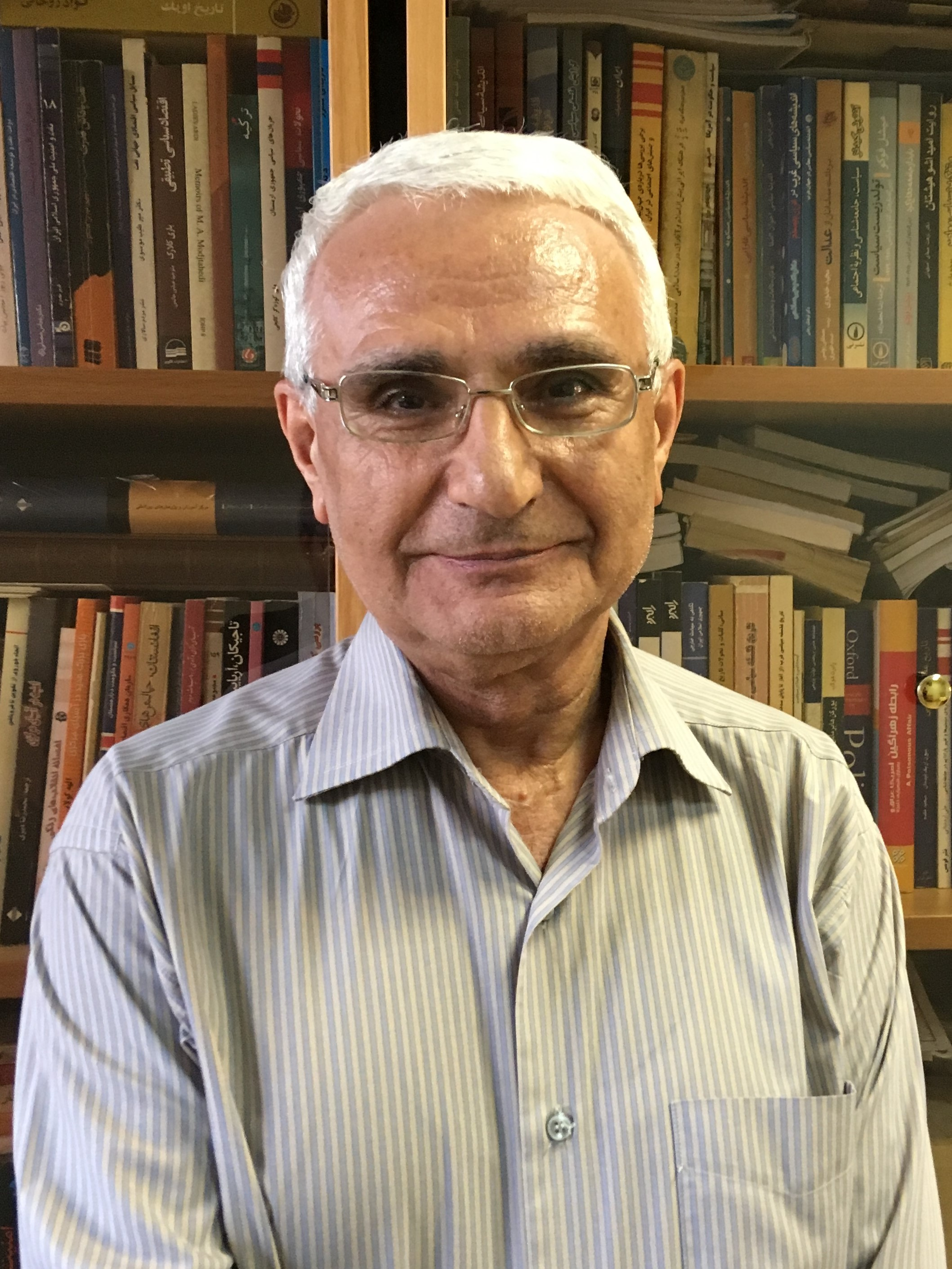 عبدالرحمن عالم در دفتر کارش در دانشگاه تهران